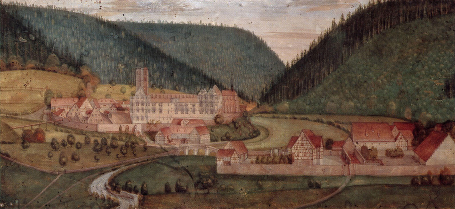 Hirsau: Gesamtansicht von Süden. Im Vordergrund rechts das Aureliuskloster, auf der Anhöhe links das Peterskloster. Hirsau: St. Peter und Paul 1091-1991. Stuttgart 1991. S. 517. Abb. 437.